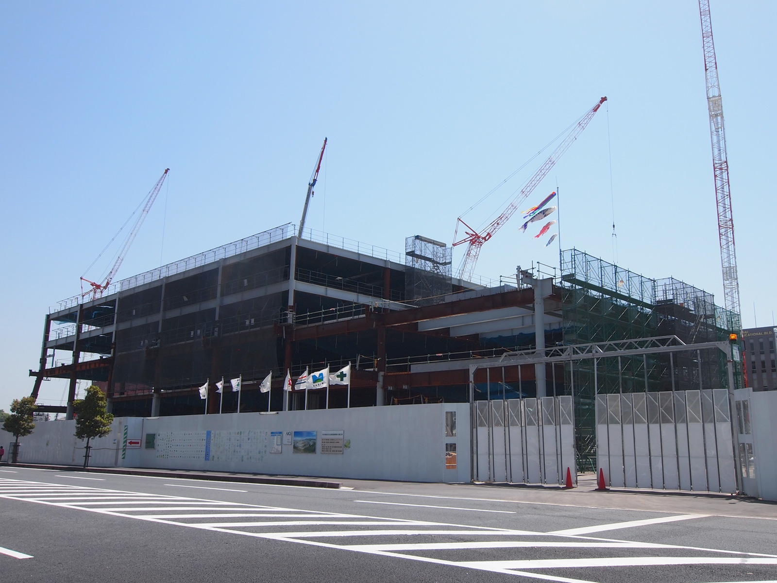 建設中のホルトホール大分（大分県大分市）